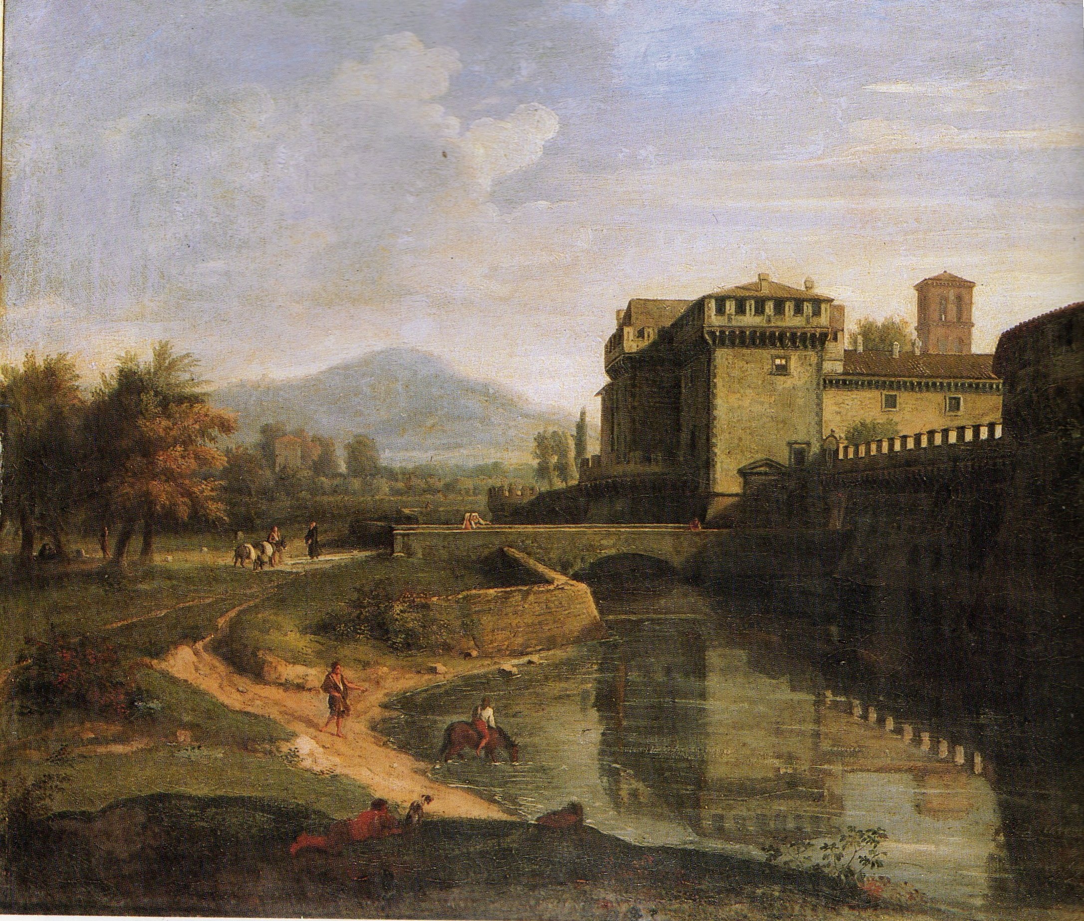 Acquerello di Franz Karl Knébel sull'abbazia di grottaferrata (RM)